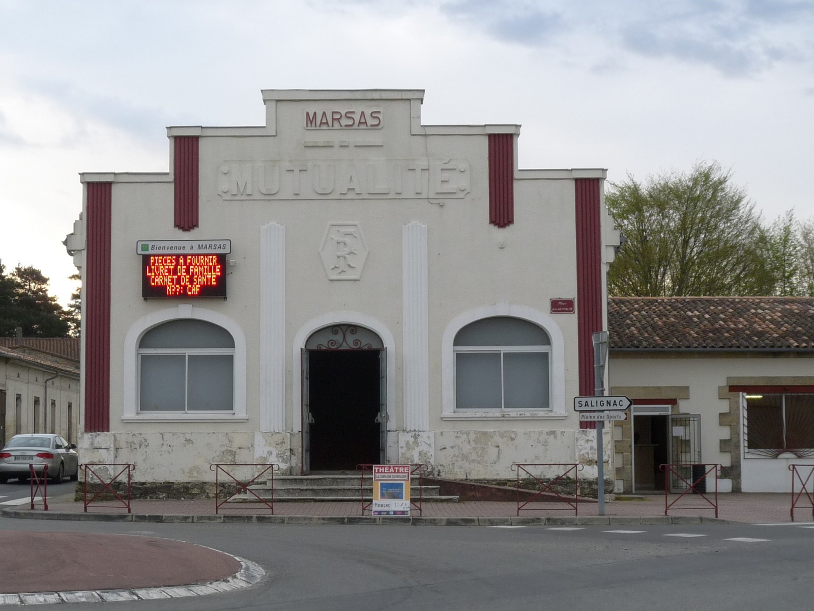 Salle des fêtes de Marsas, Gironde, France